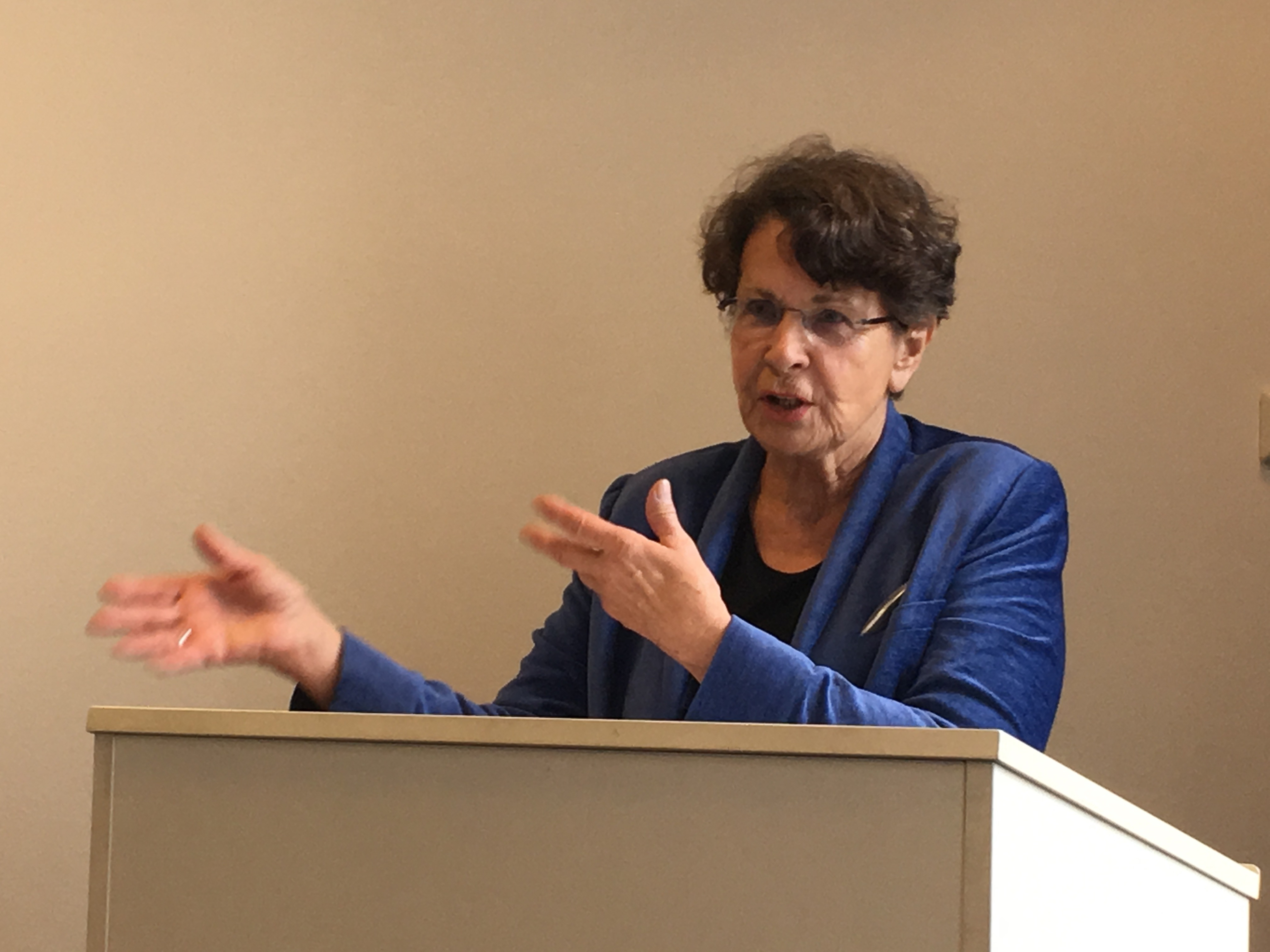 Helma Sick veim Vortrag 2019 in Berlin